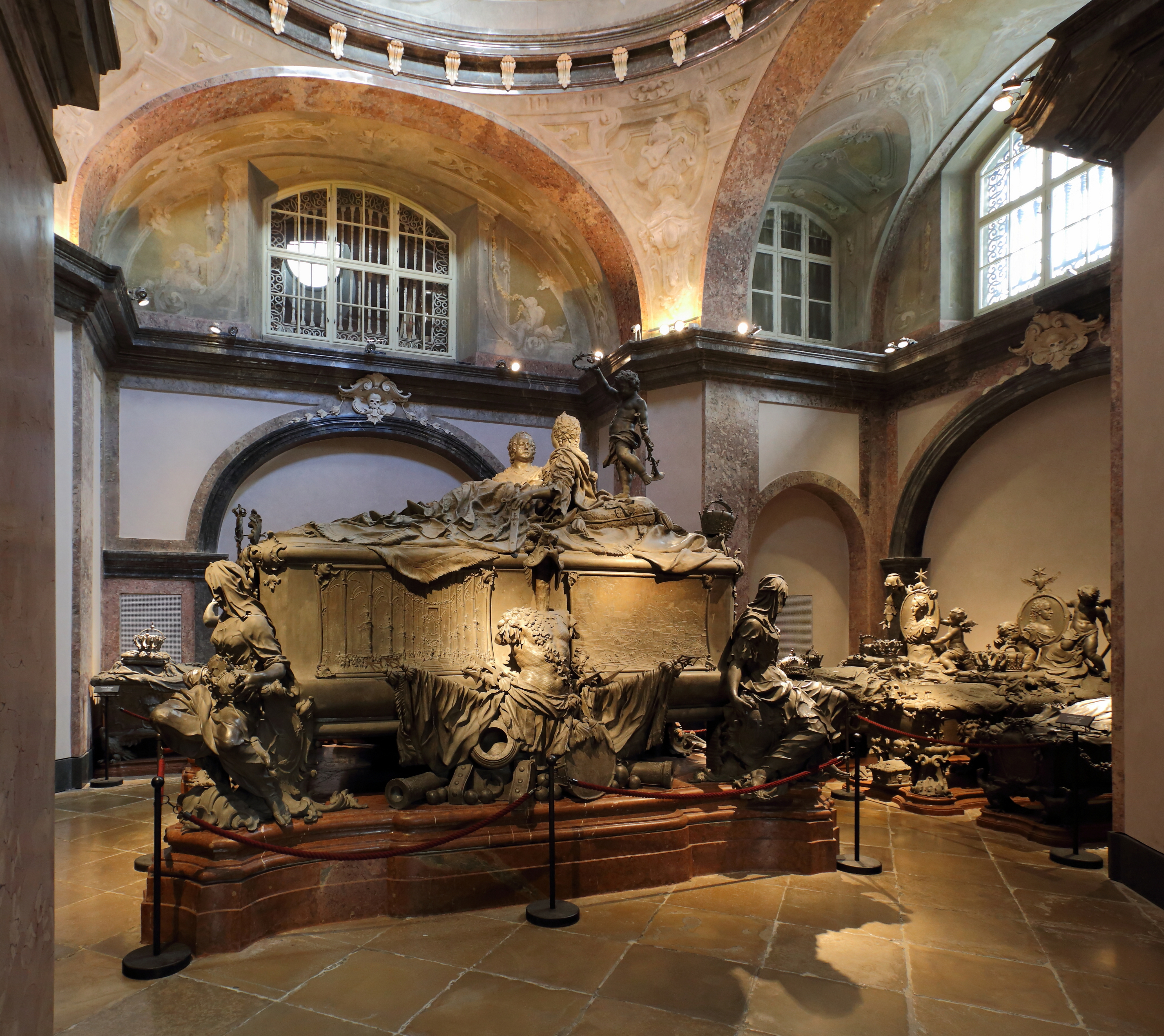 Die Maria-Theresia-Gruft in der Kapuzinergruft, Österreichs größte Gruft in Wien. In der Bildmitte der Doppelsarkophag des Kaiserpaars Maria Theresia (1717-1780) und Franz I. (1708-1765), der bereits 16 Jahre vor dem Tod der Kaiserin von Balthasar Ferdinand Moll (1717-1785) nach ihren Wünschen gefertigt wurde. Rechts in Summe 6 Sarkophage/Särge mit Töchtern, Schwiegertöchtern und Enkelinnen Maria Theresias.